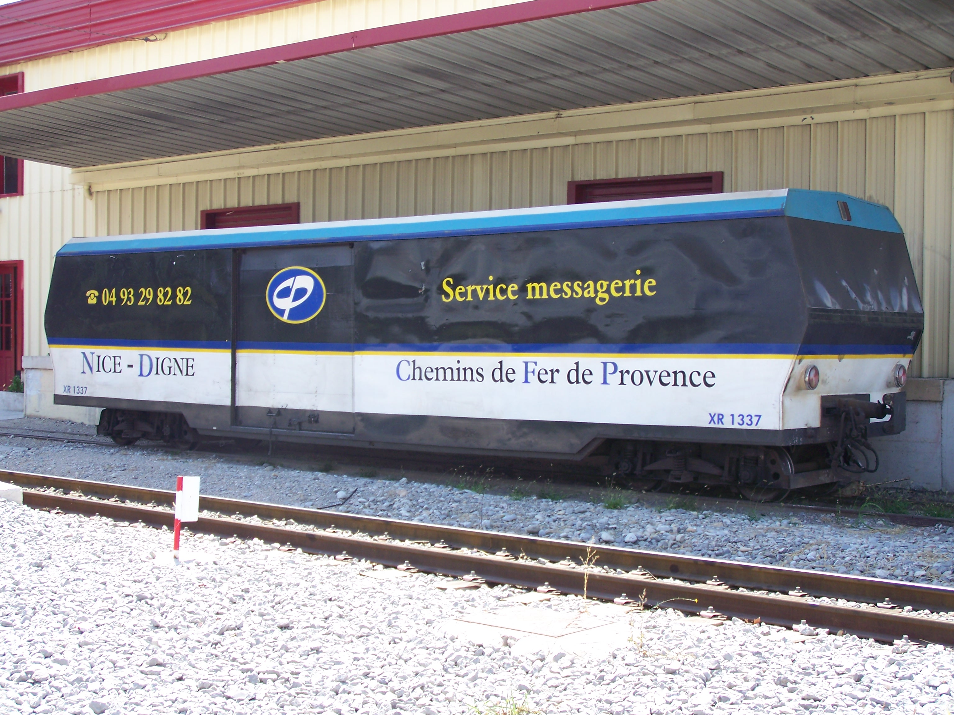 Fourgon-messagerie des Chemins de fer de Provence en gare de Nice-Lingostière (Alpes-Maritimes, France).